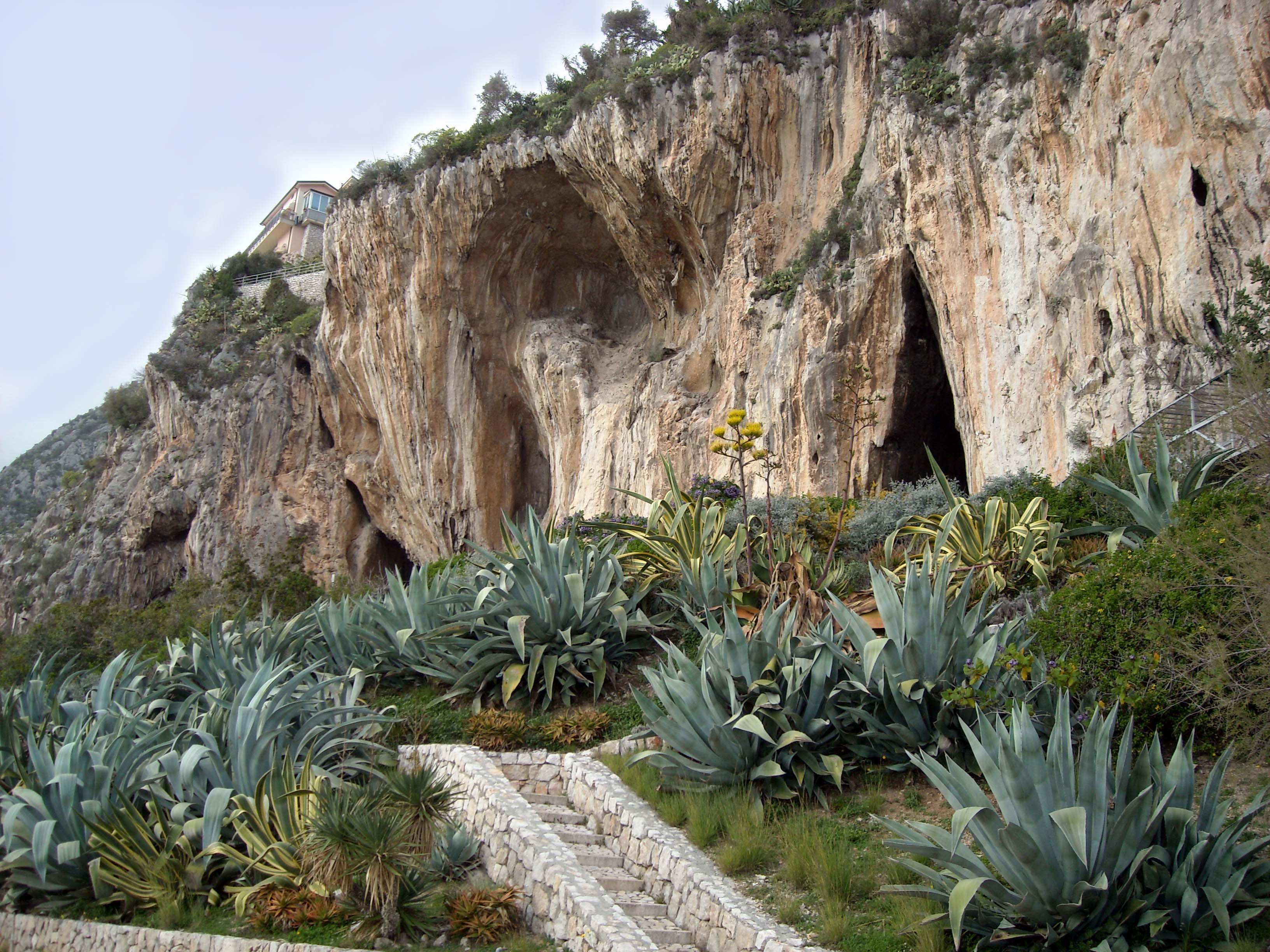 Da occidente ad oriente: Grotta dei Fanciulli, Grotta di Florestano e Grotta di Caviglione nella zona archeologica dei Balzi Rossi a Ventimiglia in Liguria, Italia. The caves of the Balzi Rossi: From west to east, cave of Fanciulli, cave of Florestano and cave of Caviglione in Ventimiglia area, Italy.